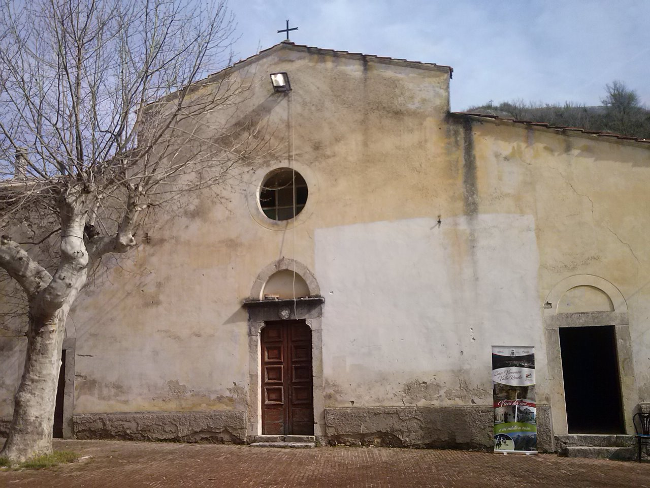 Facciata della chiesa di San Sebastiano